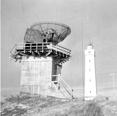 FuMO 214 "Seeriese", Betonturm mit "Würzburg-Riese" darauf. Stellung Bamberg Aufgenommen in Blaavandshuk / Südwestjütland / Dänemark